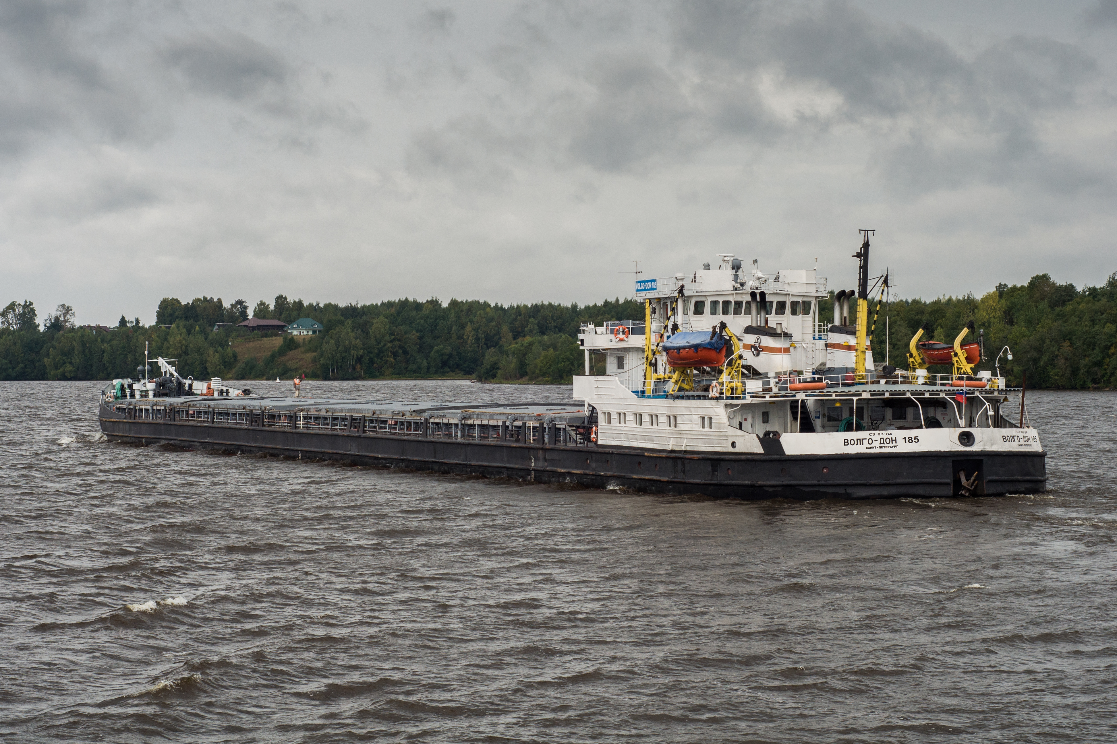 Теплоход Волго-Дон 185 (Volgo-Don 185), река Волга, Угличское водохранилище, г. Углич, близ шлюза 10-У. Снято с борта теплохода "Георгий Жуков".